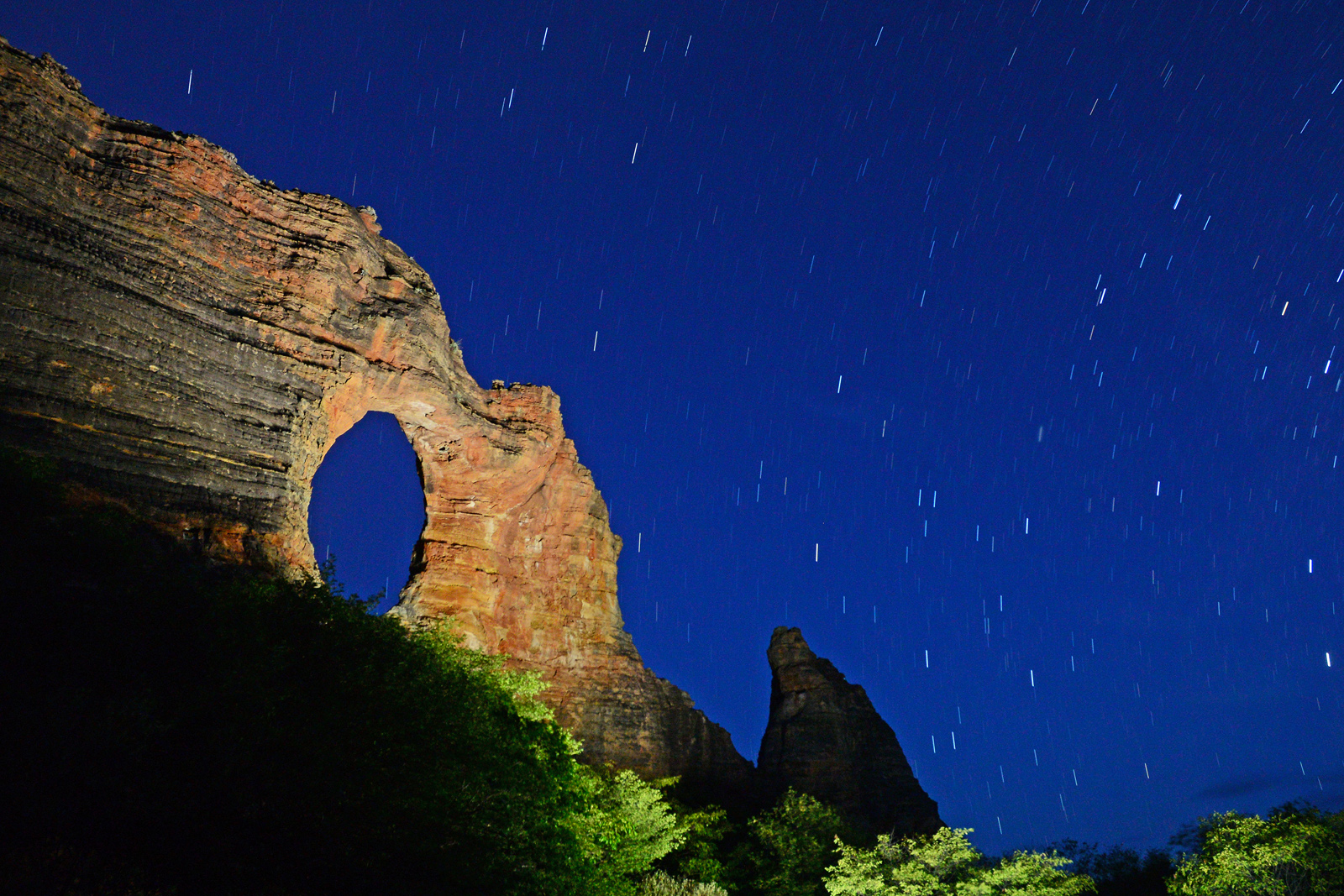 A Pedra Furada é o mais importante monumento geológico do Parque Nacional Serra da Capivara - Patrimônio Cultural da Humanidade pela UNESCO. A imagem foi capturada num dia de céu estrelado no sertão do Piauí.